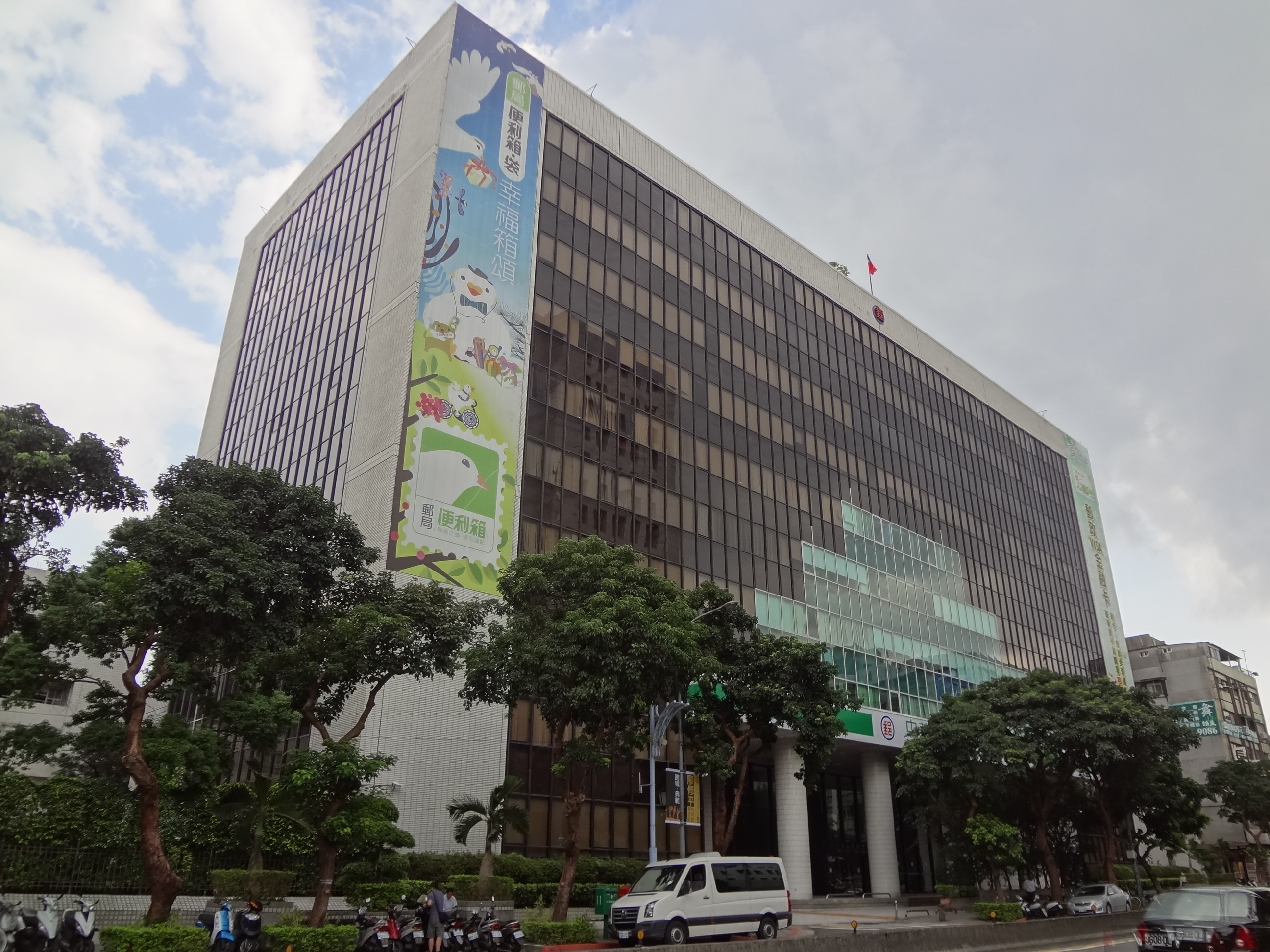 中華郵政金山大樓，地址：臺北市大安區金山南路二段55號。